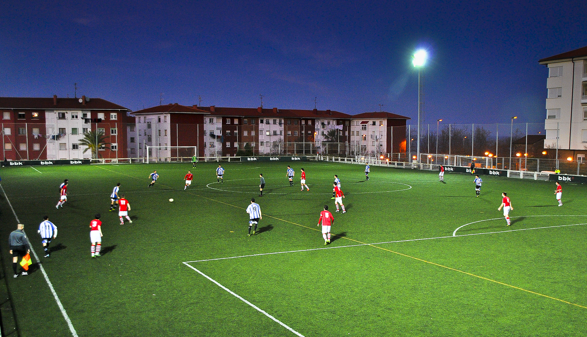 Campo de futbol PENTA durante un encuentro de fútbol